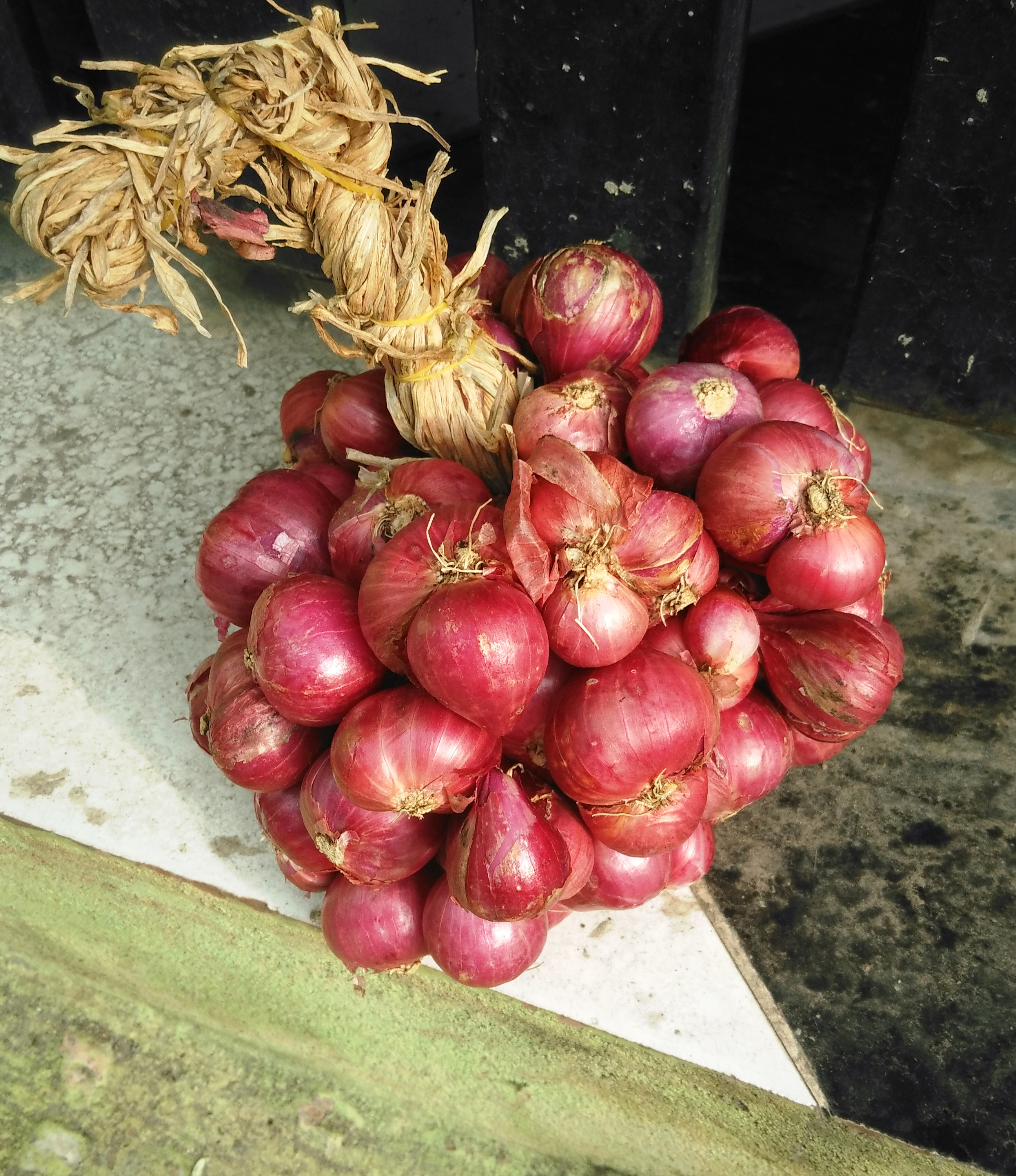 Cuisine of Vietnam